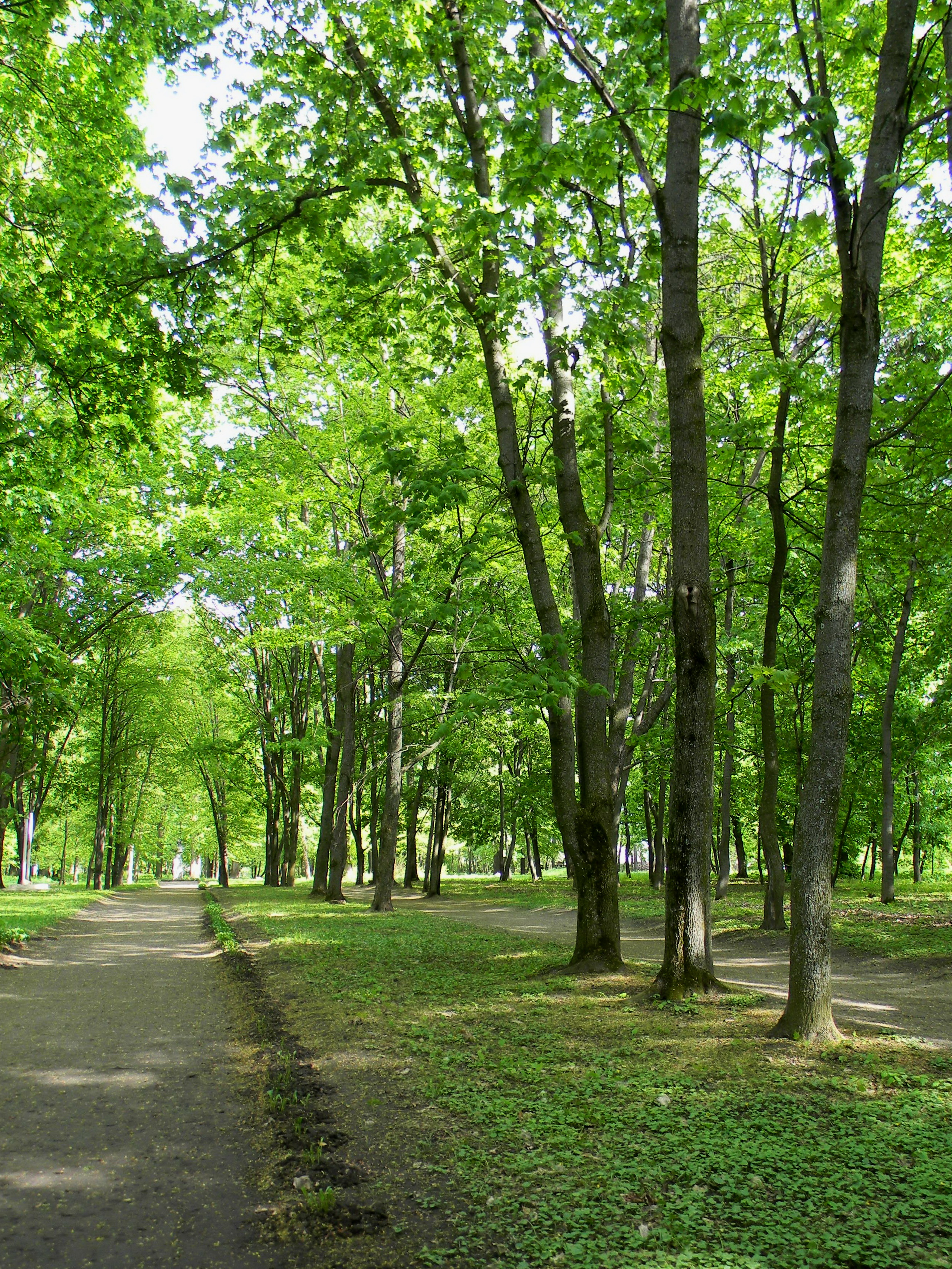 Кочубеївський, Бахмацький район, смт. Батурин